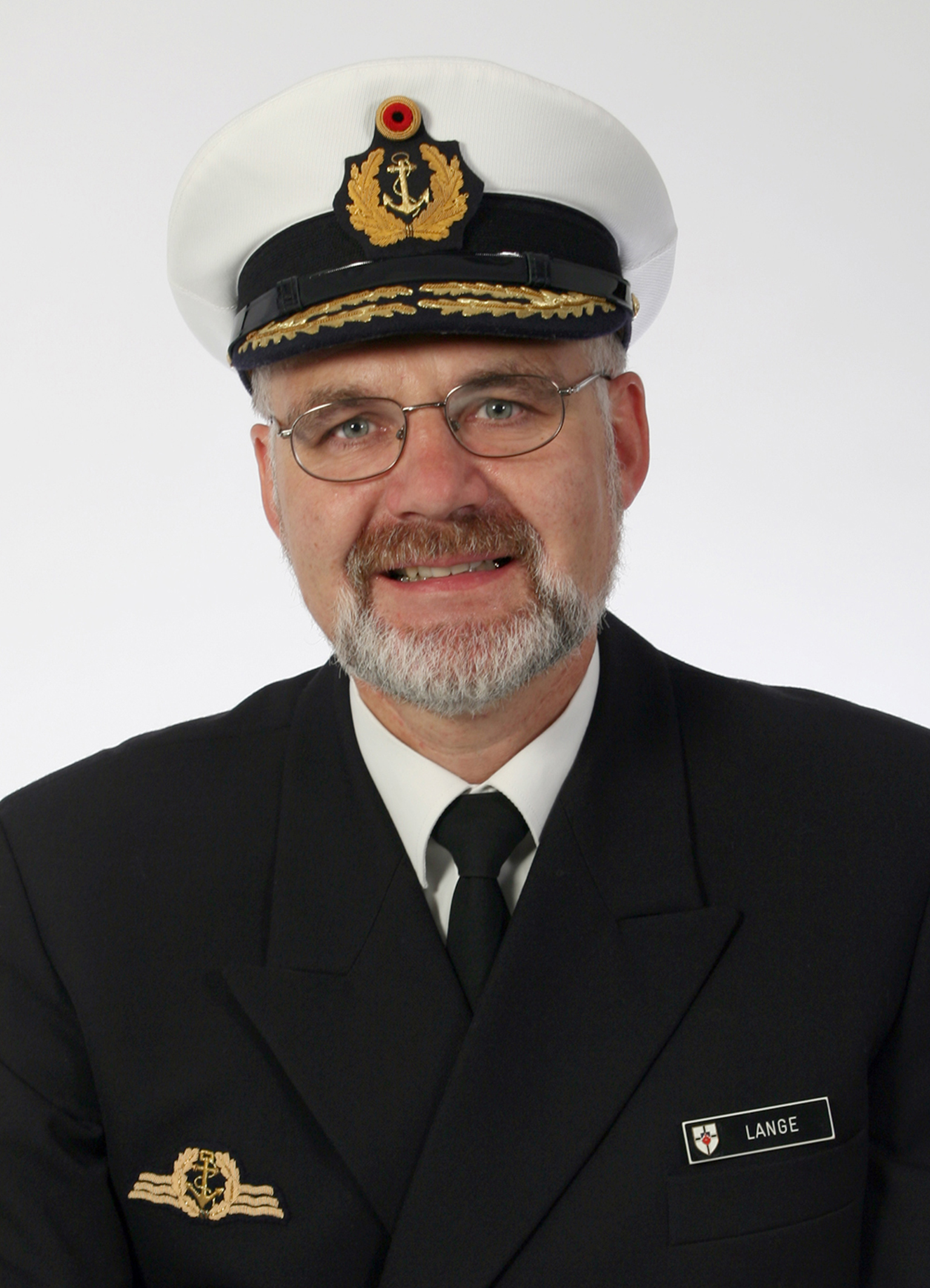 Porträtfotografie von Flottillenadmiral Heinrich Lange